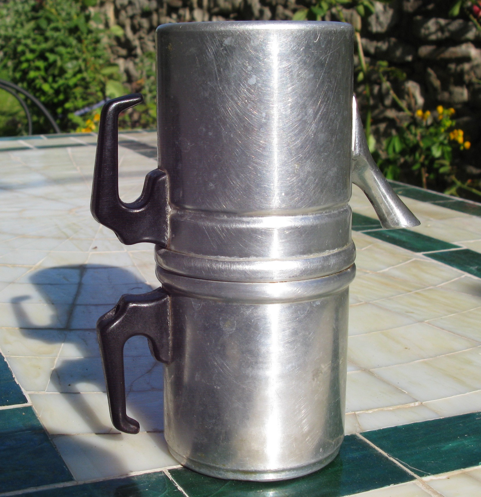 Caffettiera napoletana.